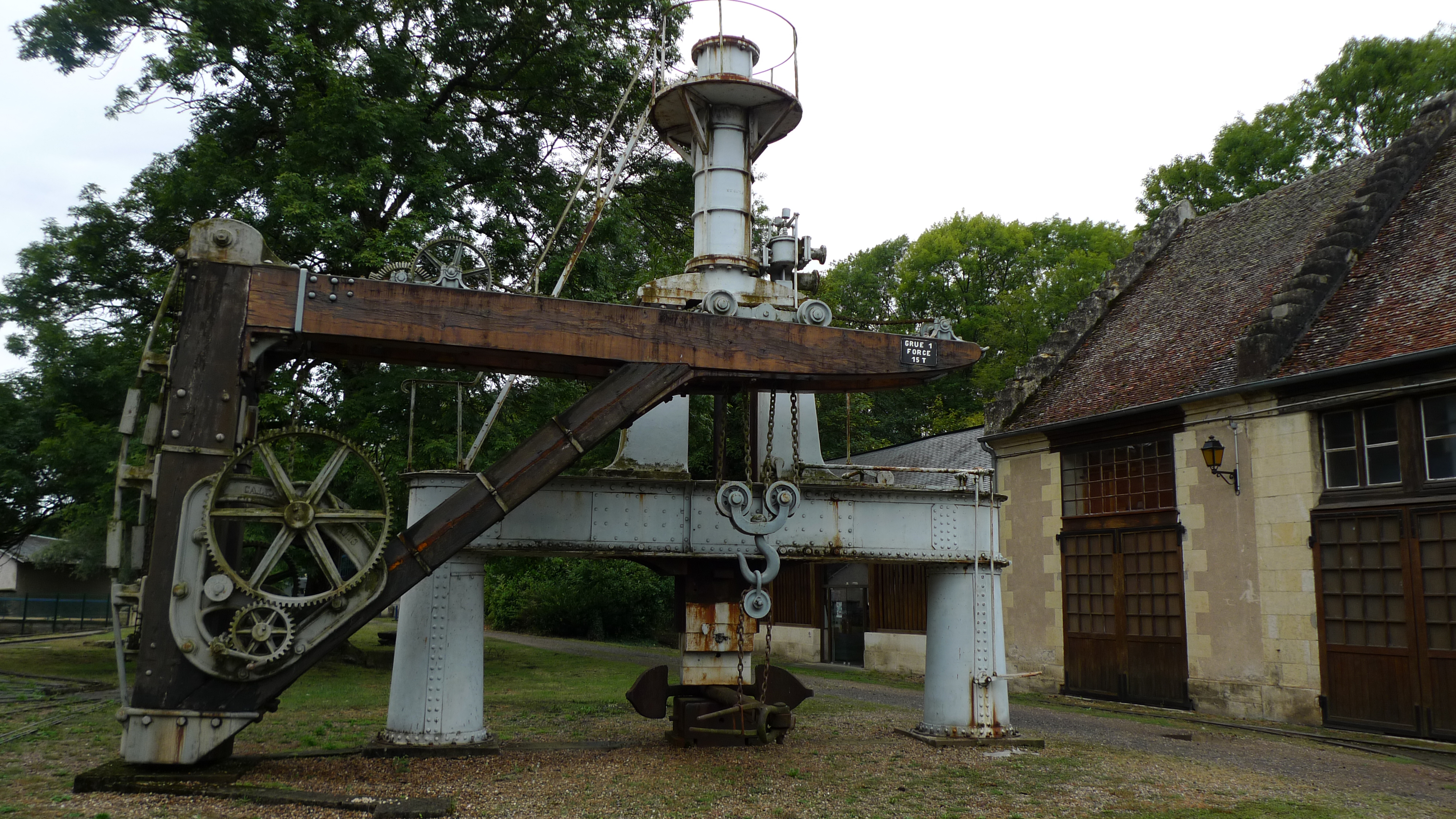 Forges royales de la Chaussade, (InscritClasséInscrit, 198219911991) .